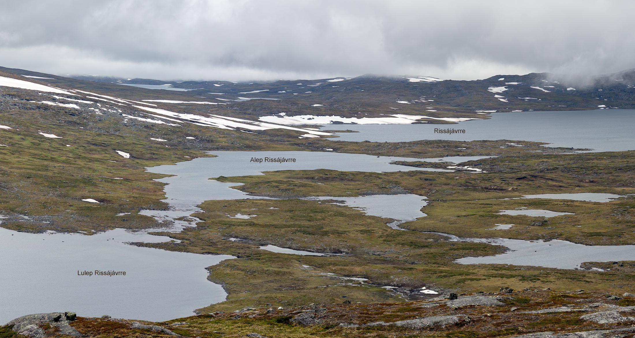 Vy mot Alep Rissájávrre från Nuortap Rissávárre.